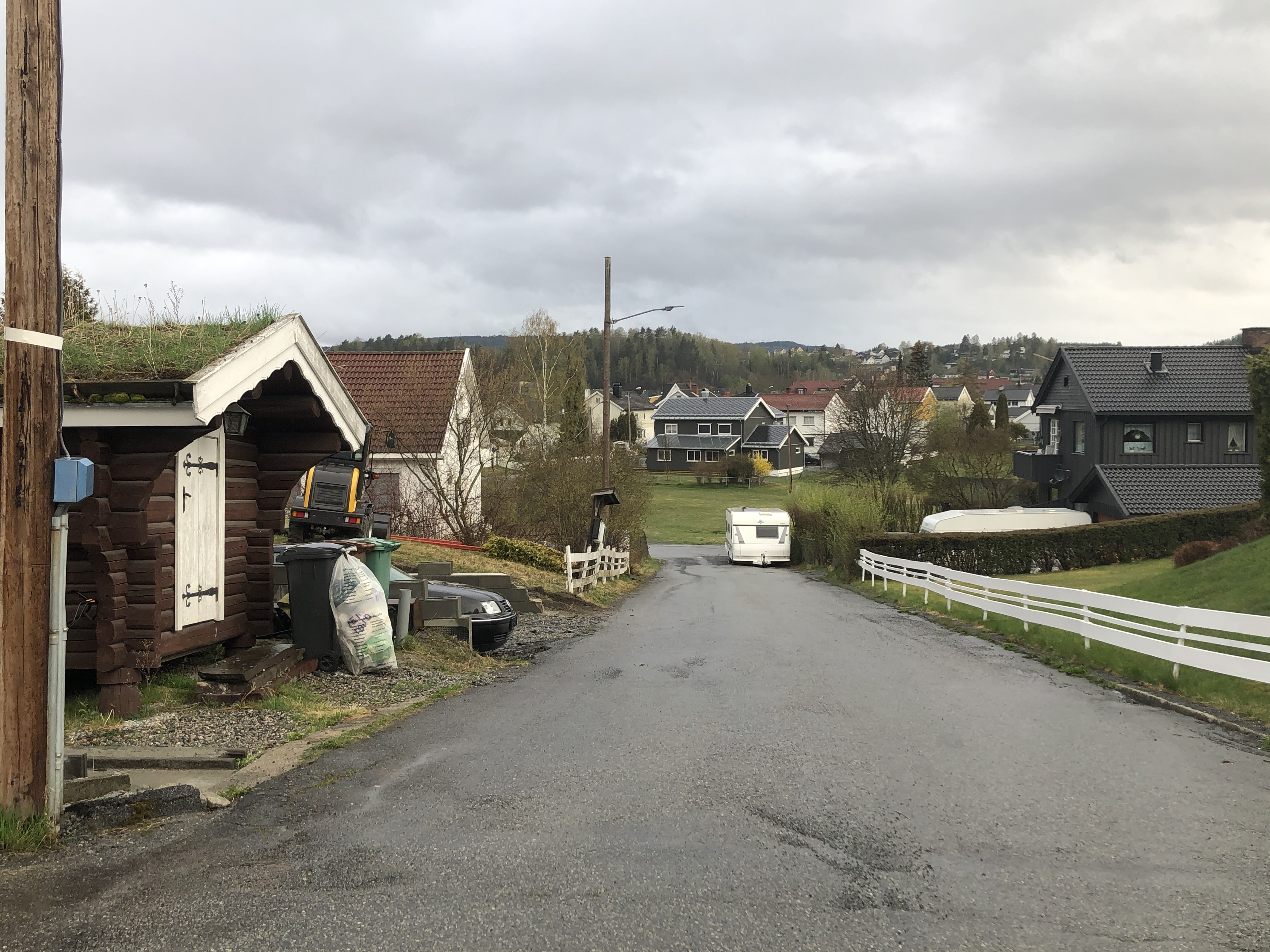 Åsmund Vinjes vei, Ringerike